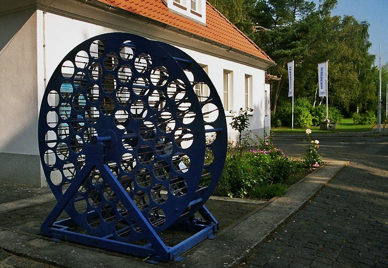 Riems, Rollenrad zur Zellkultur- und Virenvermehrung für die Impfstoffproduktion vor dem Eingangsgebäude der Riemser Arzneimittel AG. Das Rollenrad ist eine Eigenentwicklung des FLI und war 1975-1995 in Betrieb. Es fasst 128 Steilbrustflaschen je 5 l. Langsames Drehen führt zur Kulturvermehrung an den Glasinnenwänden.